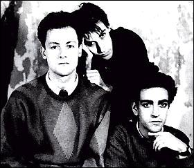 los encargados